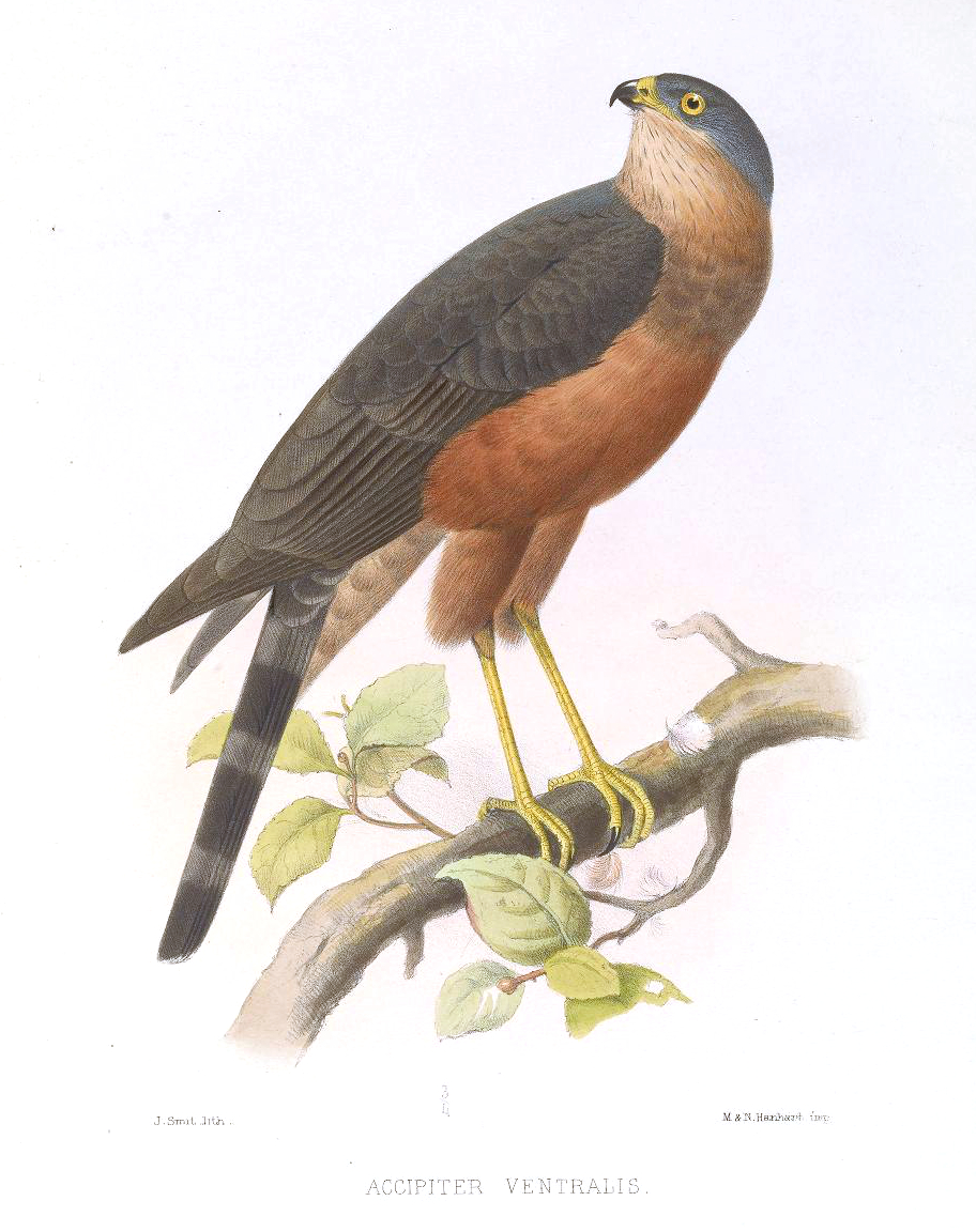 Accipiter ventralis